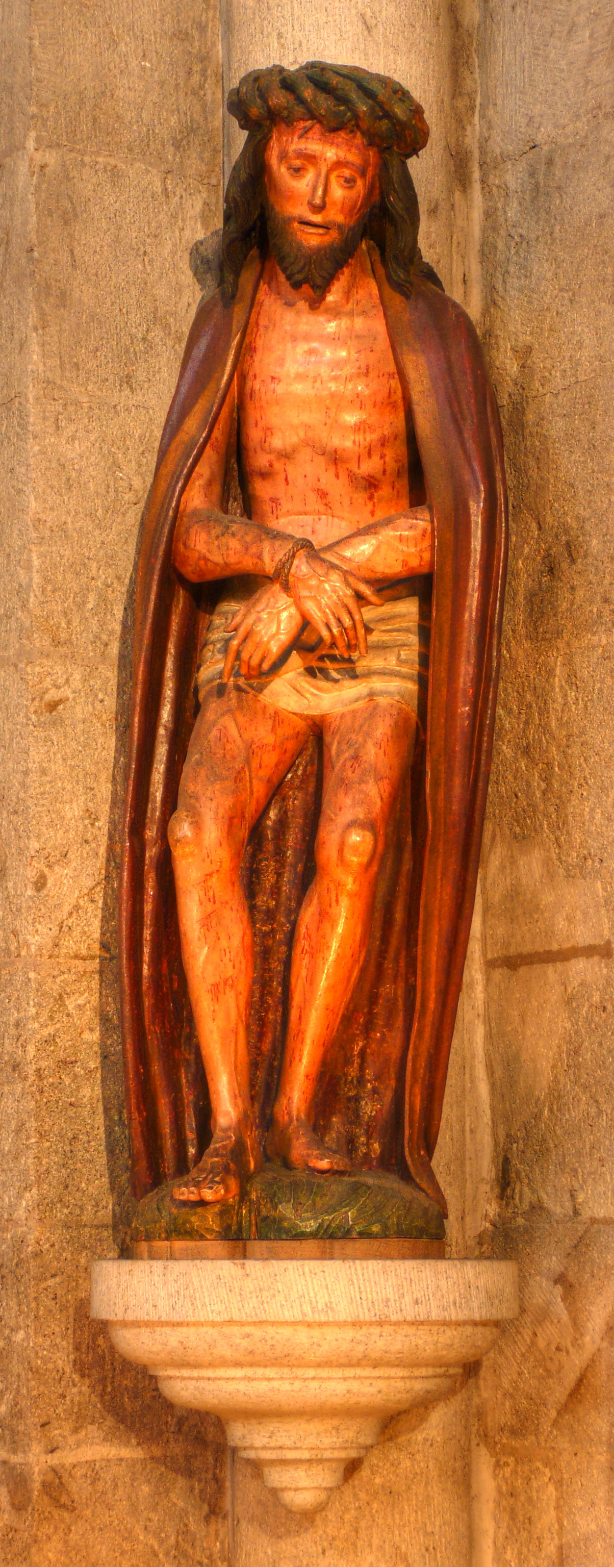 Skulptur des Christus als Schmerzensmann in der Kölner Kirche St. Aposteln (um 1450)